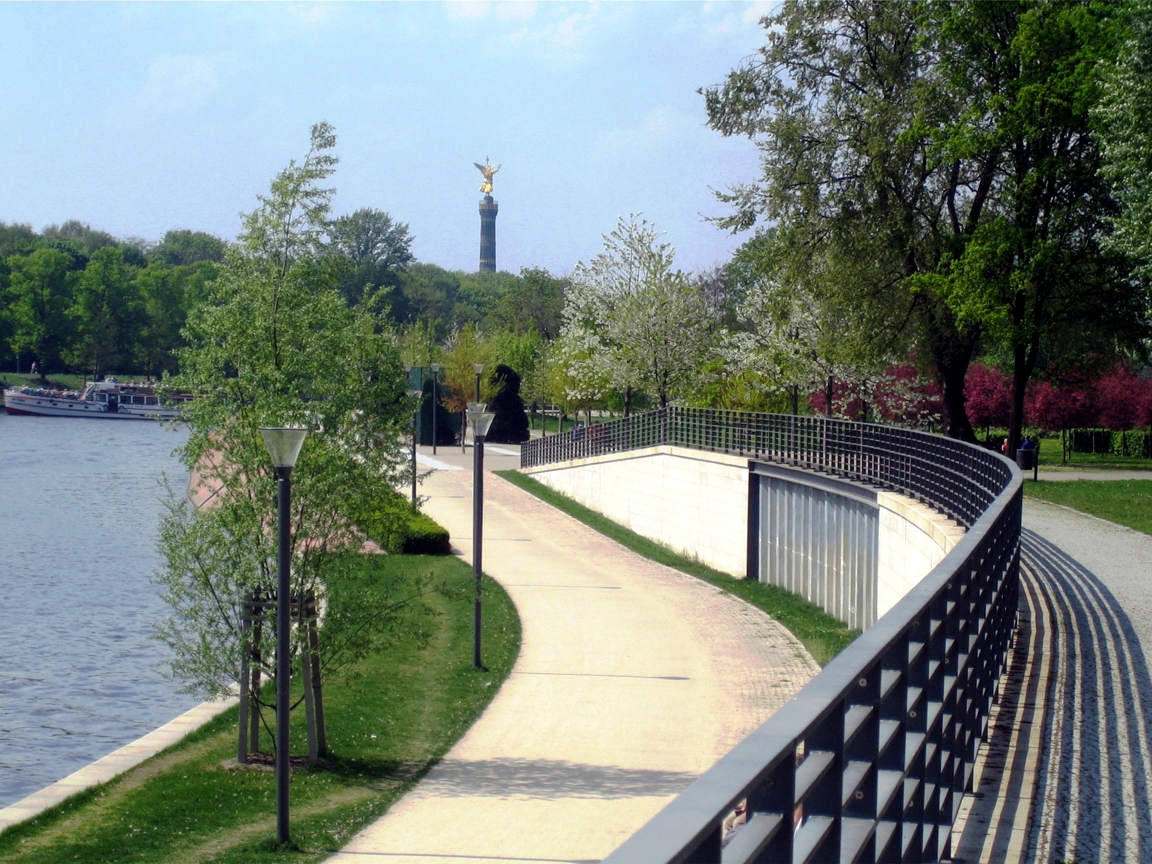 Berlin, Moabiter Werder. Bank promenade near Spree river.